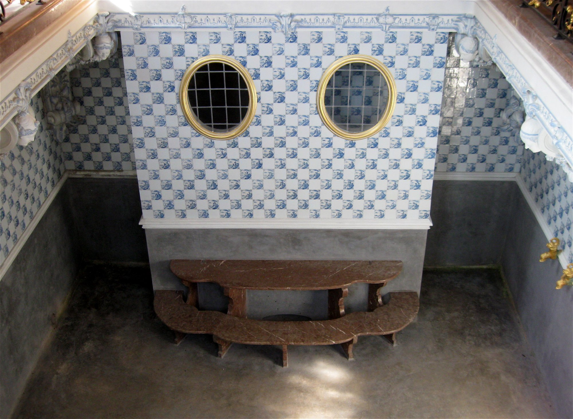 Schlosspark Nymphenburg: Badenburg, Bad